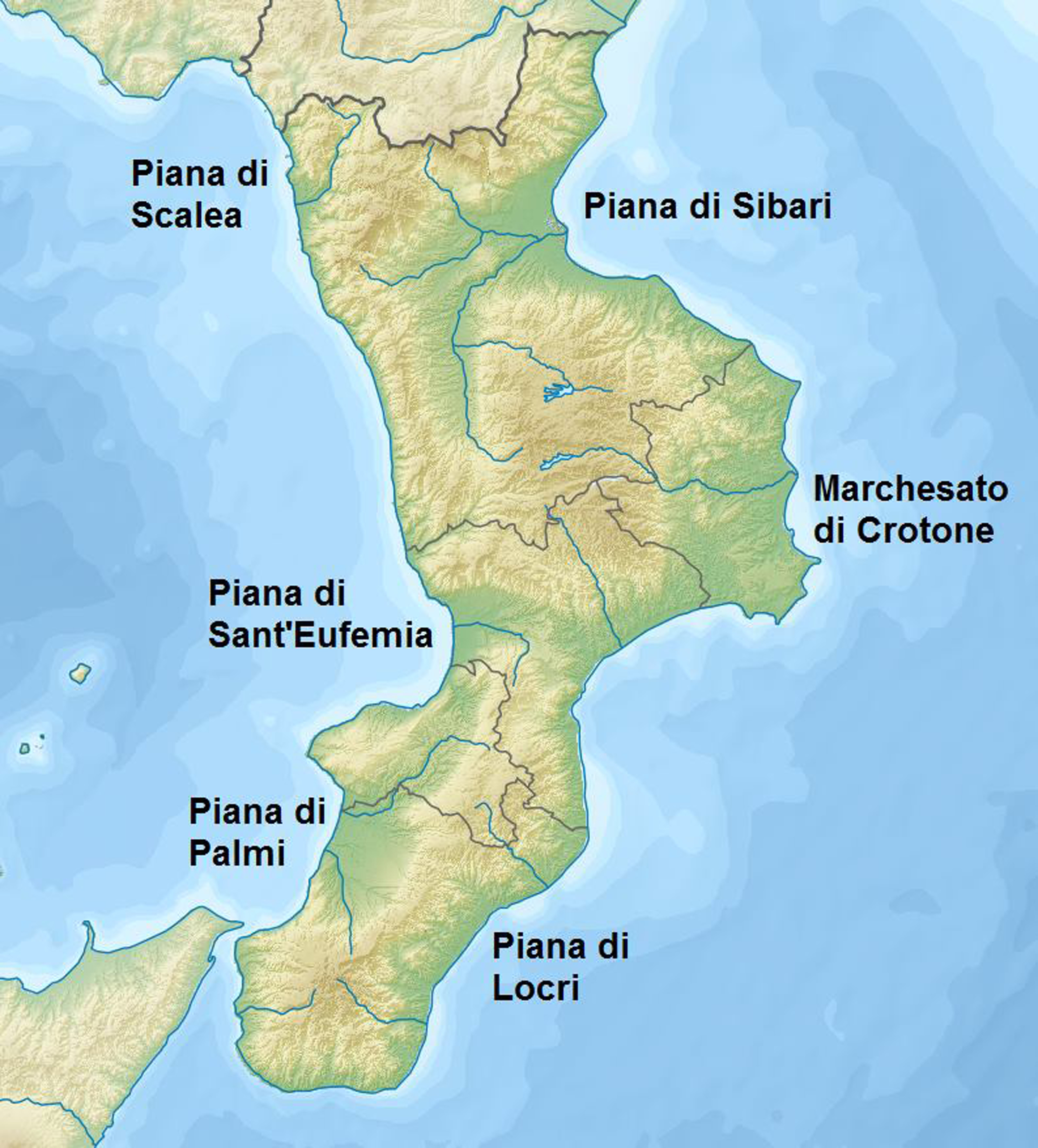 Le pianure della Calabria: Piana di Scalea; Piana di Sibari; Marchesato di Crotone; Piana di Sant'Eufemia; Piana di Palmi; Piana di Locri